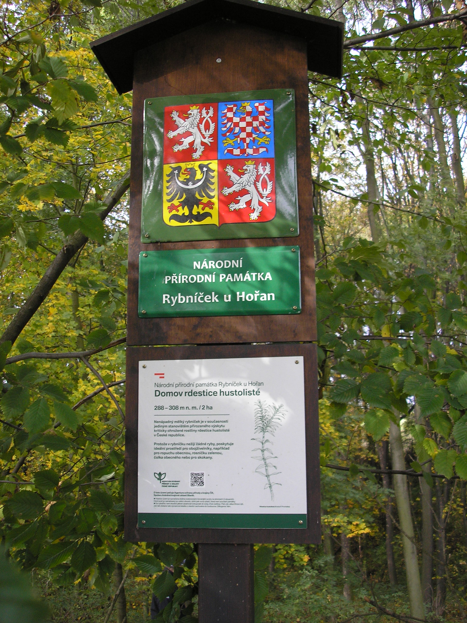 Hraniční cedule na východní straně